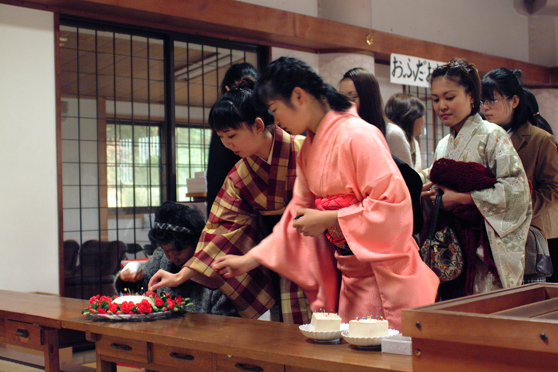 淡島神社説明用として。